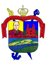 Escudo del municipio García, Isla de Margarita, Estado Nueva Esparta, Venezuela